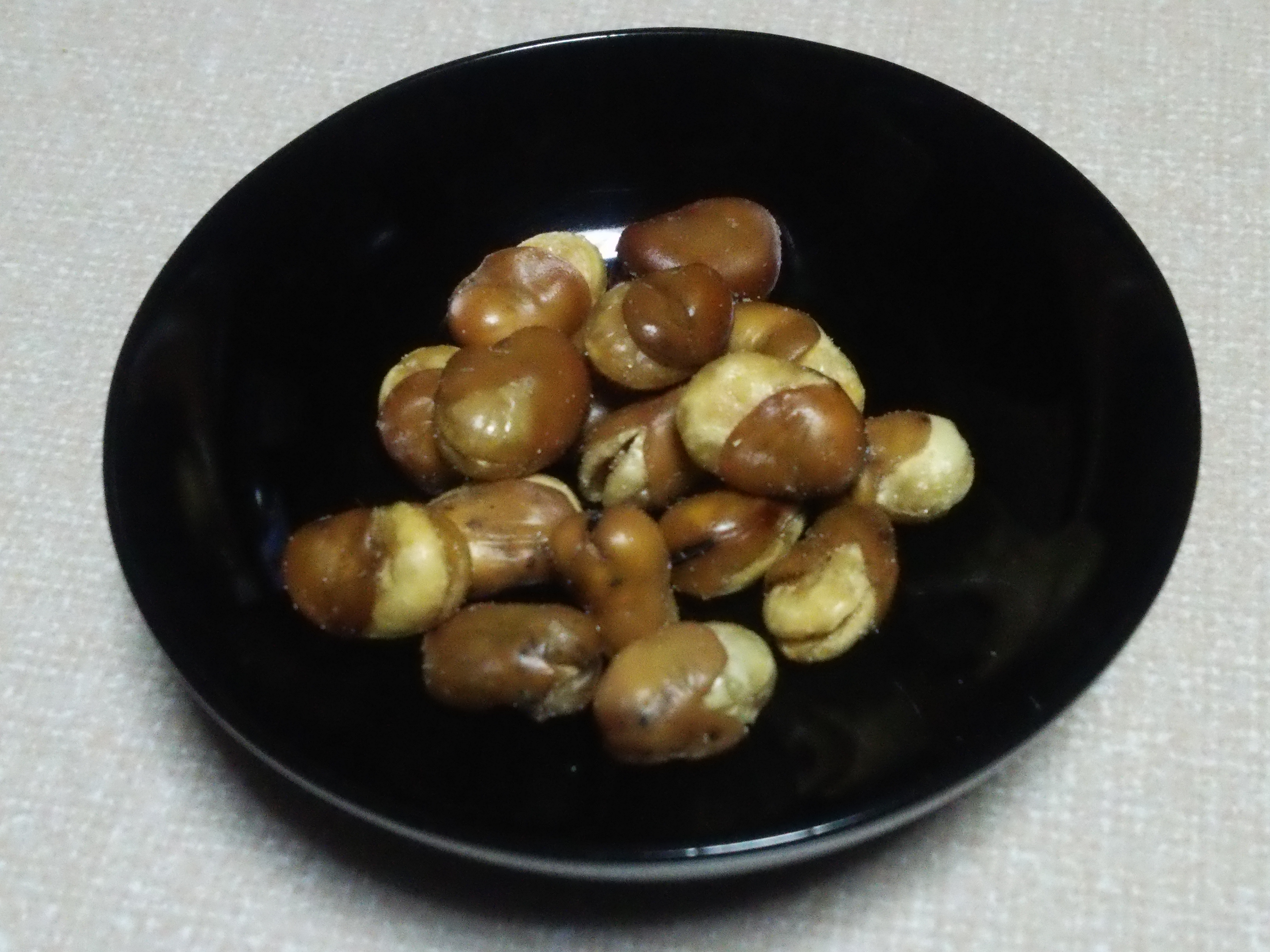 奈良発祥の「フライビーンズ」